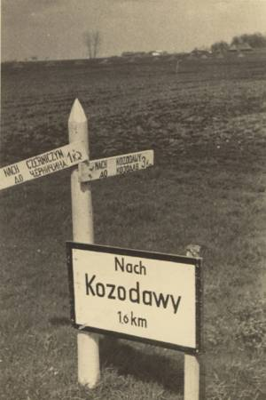 Вказівки при дорозі.1939-1944 роки.